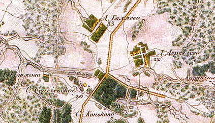 Участок. Топографическая карта окружности Москвы, снятая офицерами Квантирмейстерской части 1818 года. Гравирована и печатана в военно-топографическом бюро при главном штабе его импереторского Величества 1823 года.